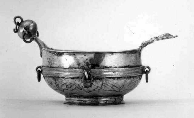 Øreskål eller kåse av en type som har vært særlig populær i samiske miljøer. Laget i Luleå av Olof Löfvander (1753-1785). Lengde 11,3 cm. Innkommet til Norsk Folkemuseum fra Møre og Romsdal. NF.1910-0498.